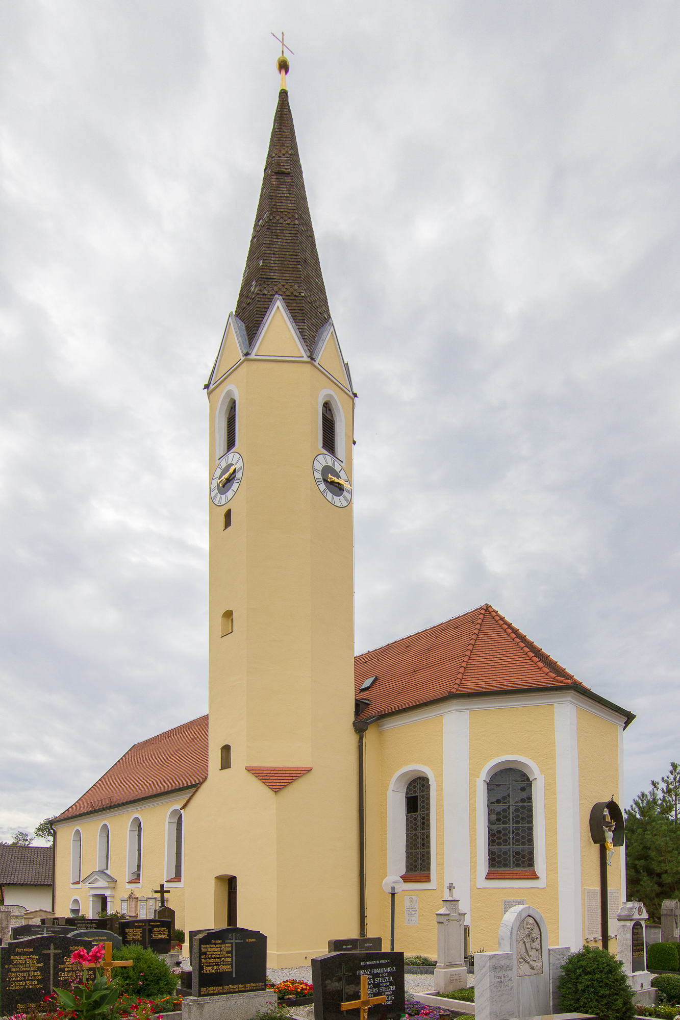 Katholische Pfarrkirche St. Stephan erbaut 2. Hälfte 17. Jahrhundert; mit Ausstattung.This is a photograph of an architectural monument.